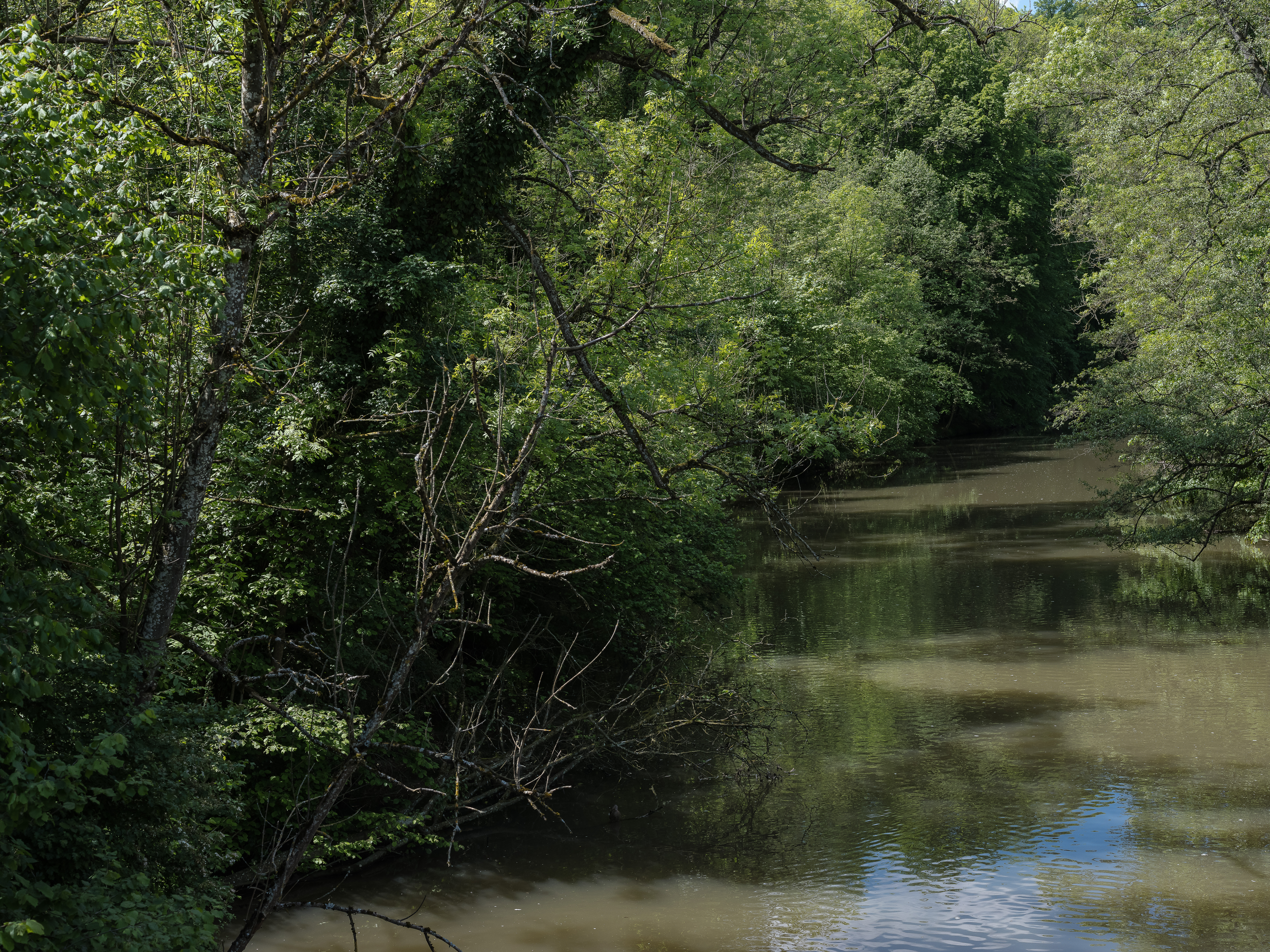 Baden-Württemberg, Remseck am Neckar, Naturschutzgebiet unteres Remstal.